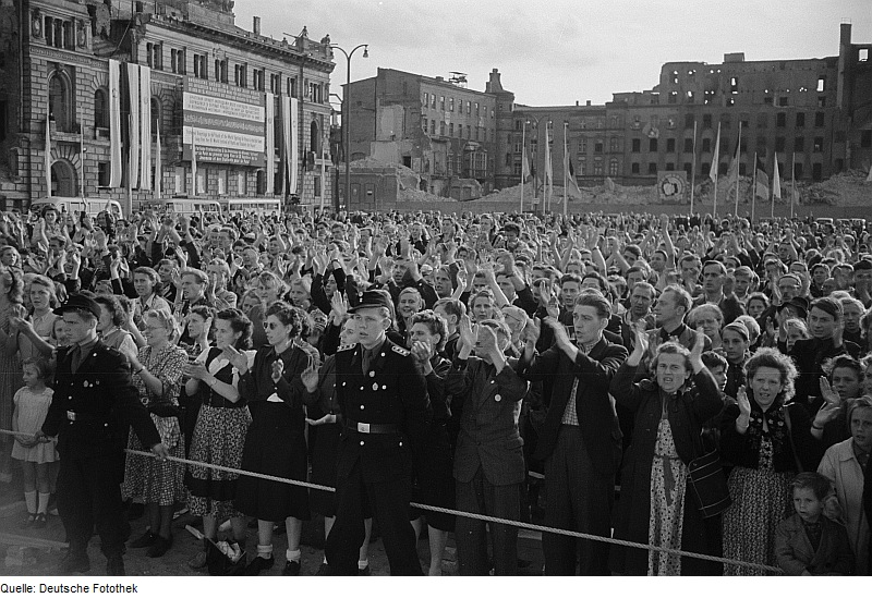 Original image description from the Deutsche Fotothek Blick auf die Zuschauer des Kulturprogramms